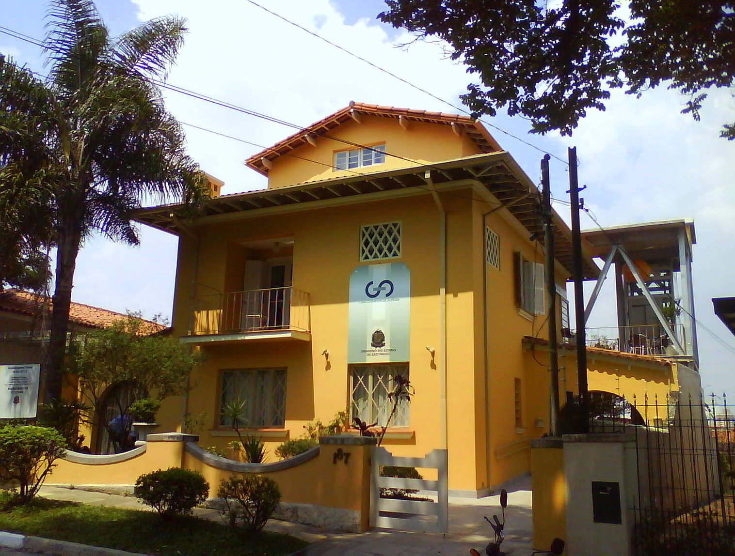 Museu Casa Guilherme de Almeida, no bairro do Pacaembu, distrito de Perdizes, São Paulo, SP, Brasil.